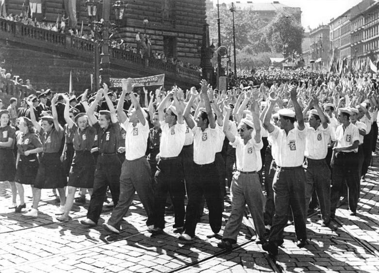 Prag, Weltfestspiele, Abschlussdemonstration ADN-ZB CTK-2.6.72 Prag:Erste Weltfestspiele der Jugend und Studenten-Mitglieder des tschechoslowakischen Jugendverbandes während der großen Demonstration zum Abschluß der 1.Weltfestspiele in Prag am 17.August 1947. Information added by Wikimedia users.